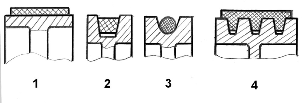 Courroie plate Courroie ronde Courroie trapézoïdale Courroie côtelée